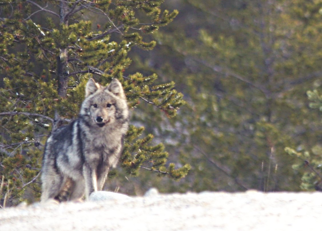 Wolf seen before hunt